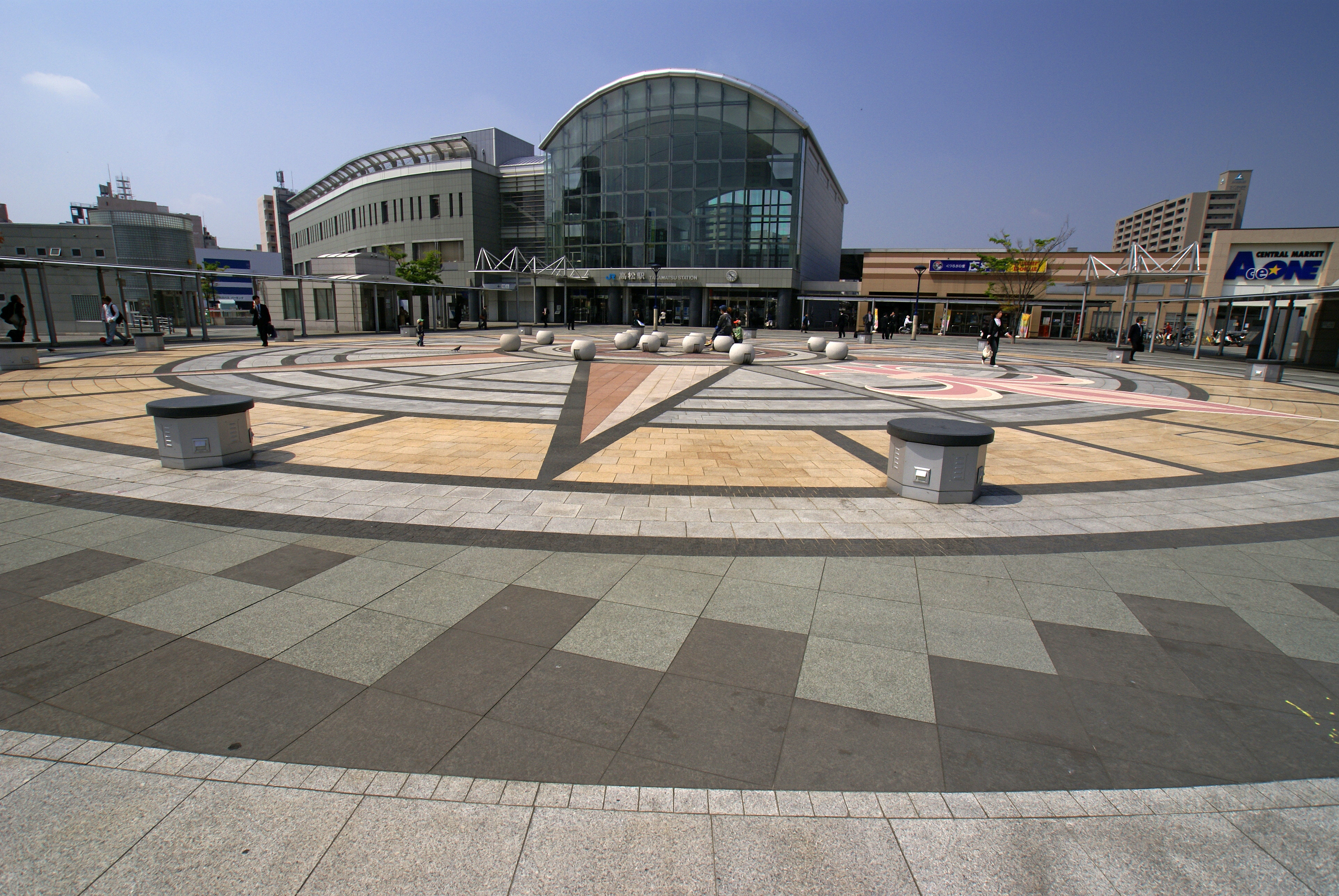 Takamatsu Station in Takamatsu, Kagawa, Japan